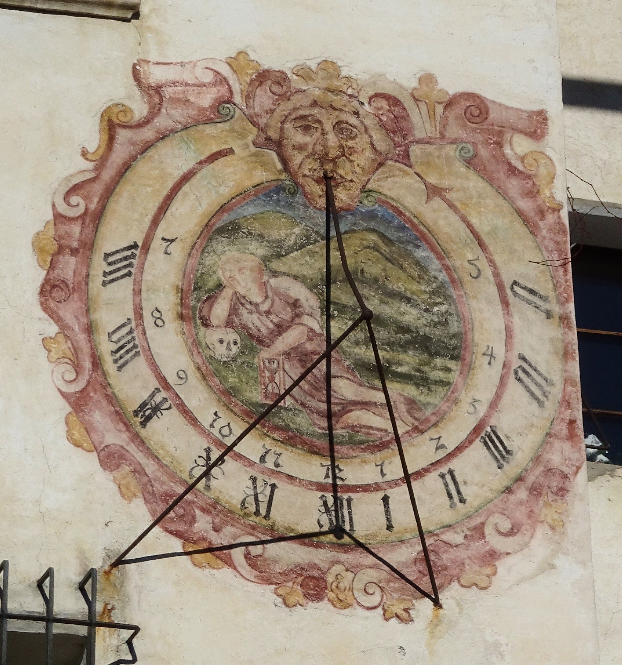 Schloss Liemberg, Sonnenuhr an der Front- (Süd-) Fassade